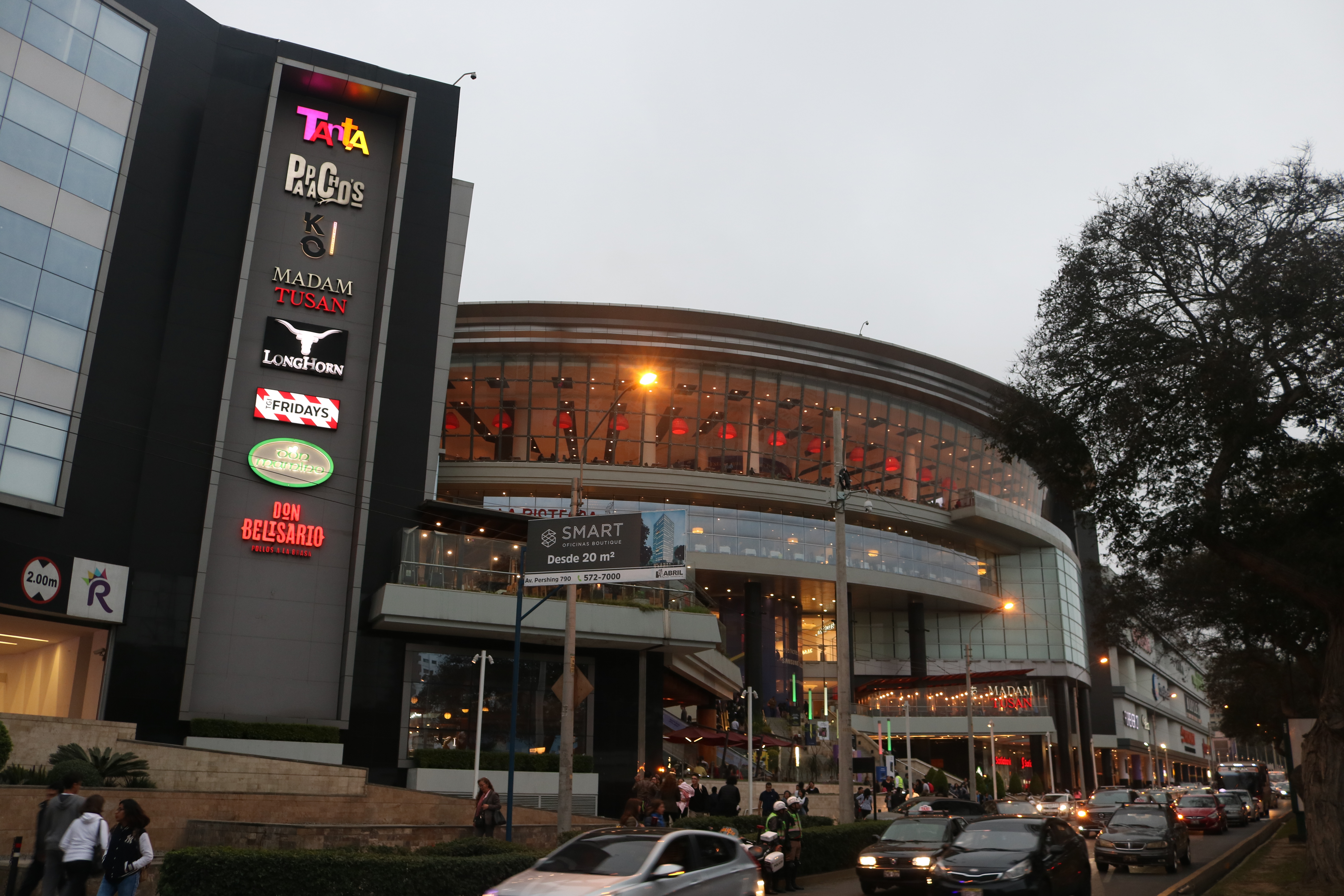 Exterior del Real Plaza Avenida Salaverry tomado durante el atardecer desde la Av. Salaverry.